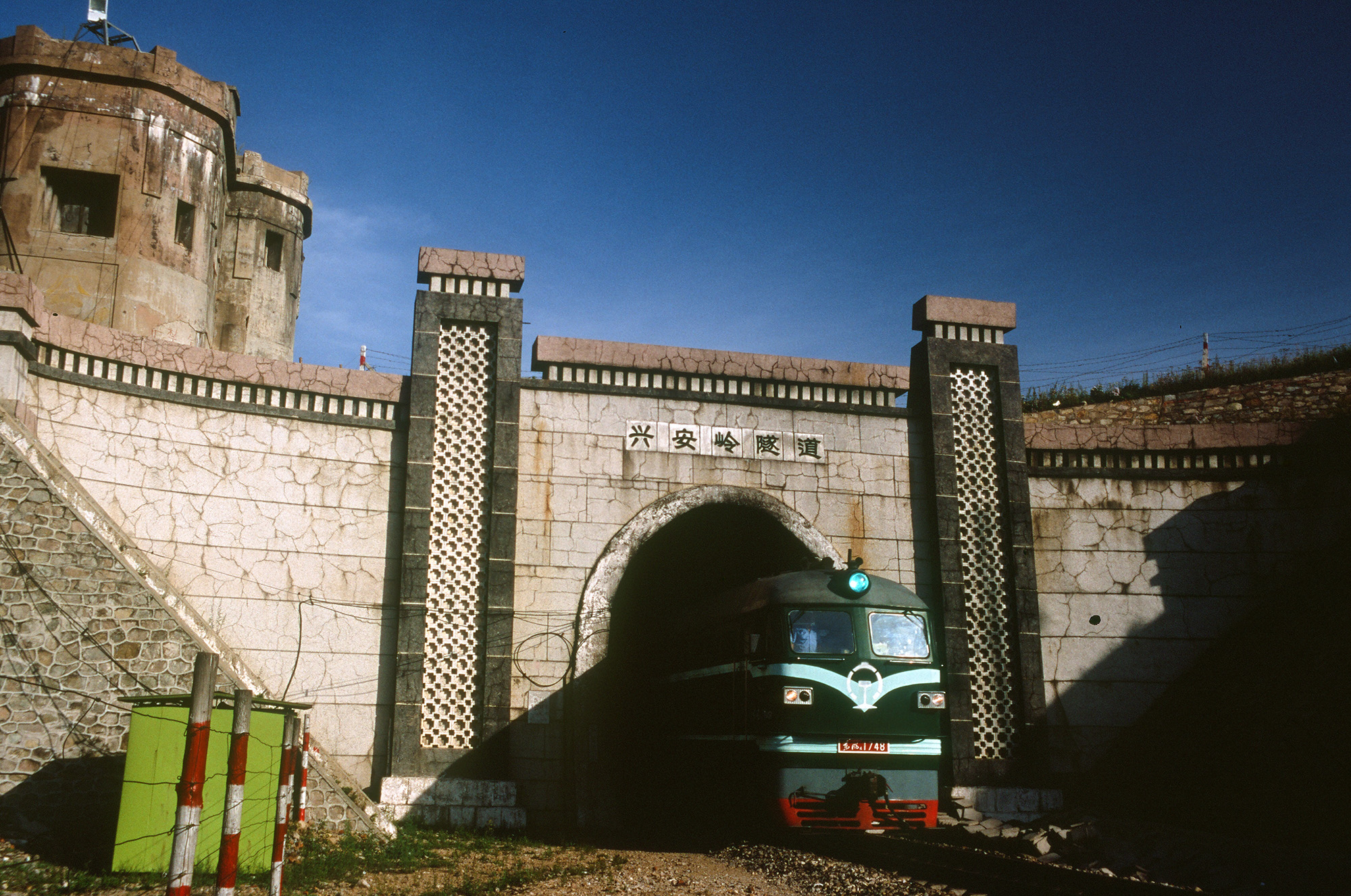 兴安岭隧道